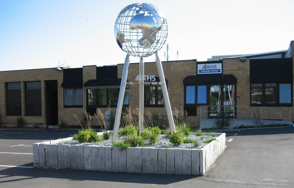 KHS Dortmund, Weltkugel auf dem Parkplatz